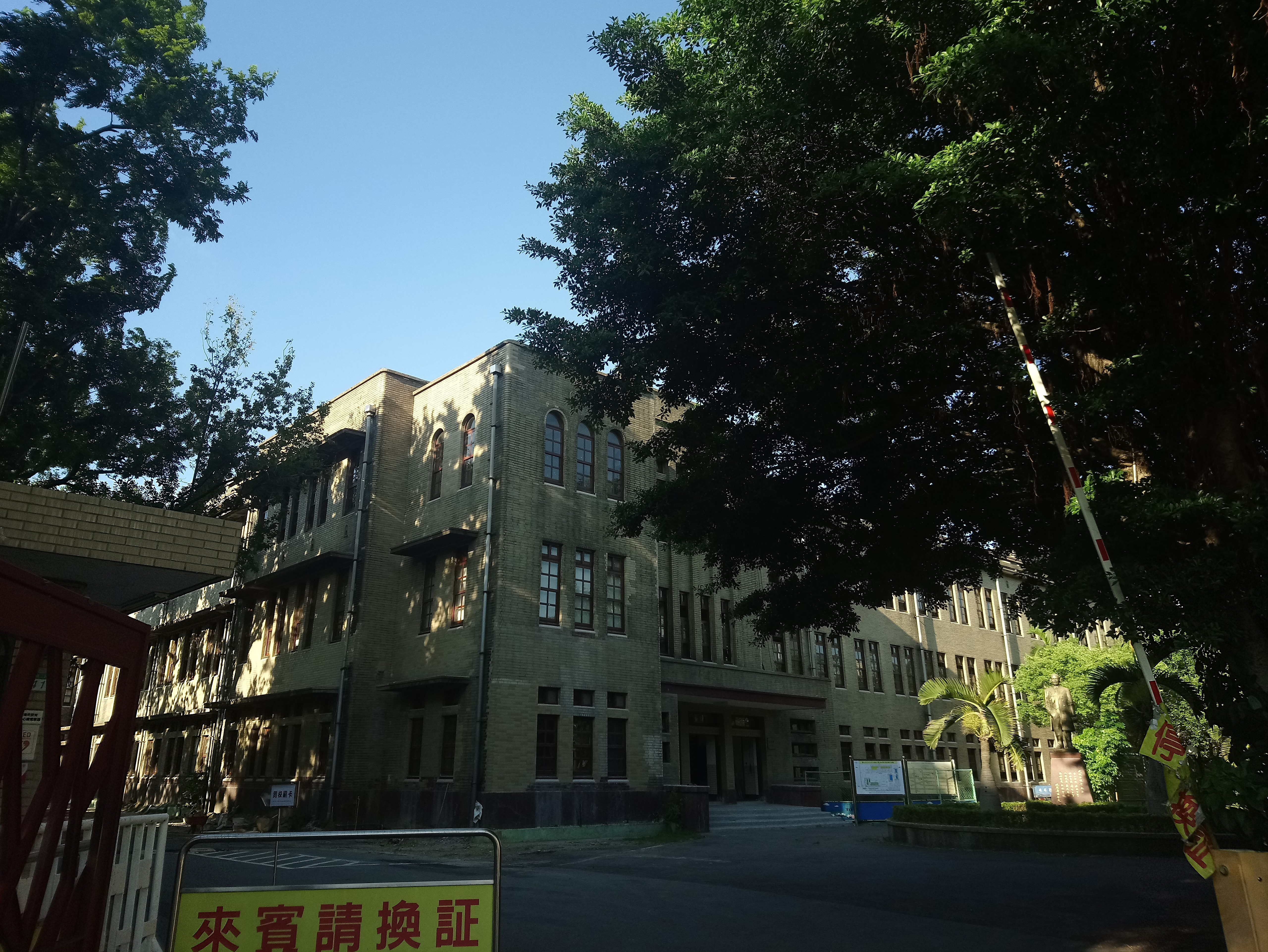 臺北州立臺北第三高等女學校,臺北市中山區朱厝崙次分區力行里